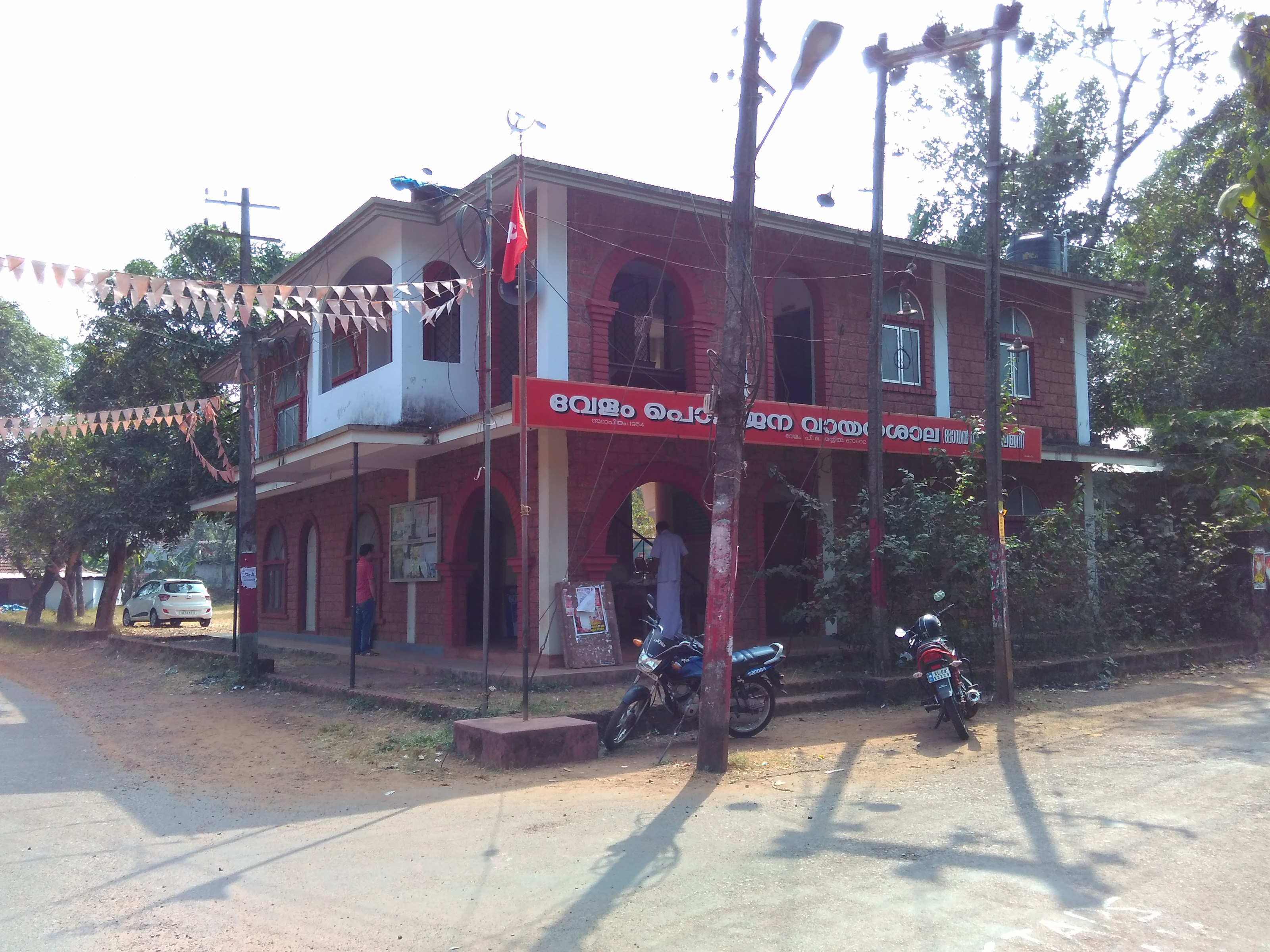 Velam Pothujana Vayanasala